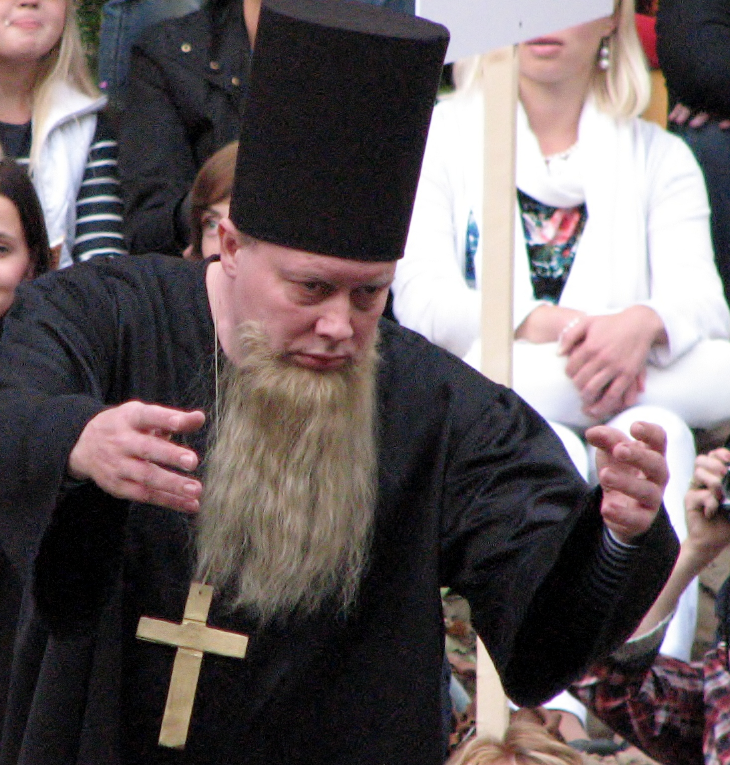 Allan Noormets keksleva kirikupapi rollis Tallinna Linnateatri 48. hooaja avamisel